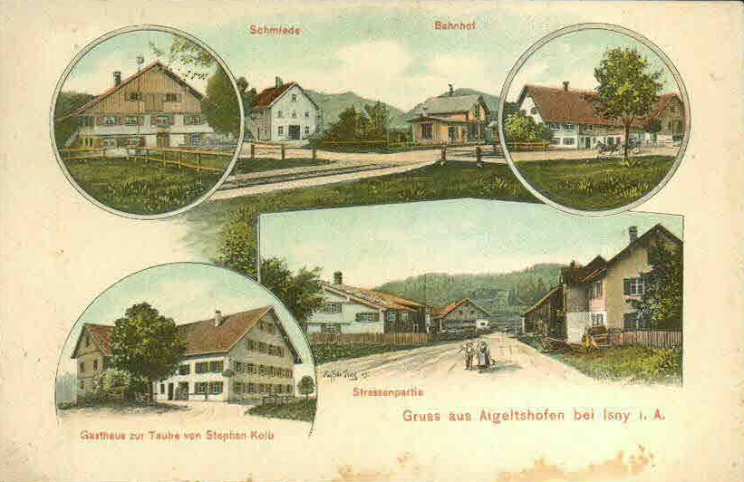 Ansichtskarte von Eugen Felle; Technoseum (Landesmuseum für Technik und Arbeit Mannheim)Motiv: Gruß aus Aigeltshofen bei Isny i. A.